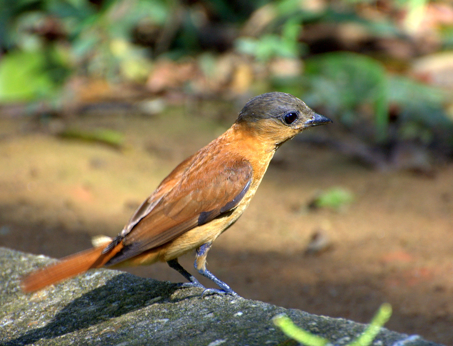 Pachyramphus validus, Jardim Botânico de São Paulo